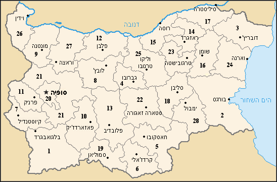 תרגום לעברית של מפת מחוזות בולגריה.